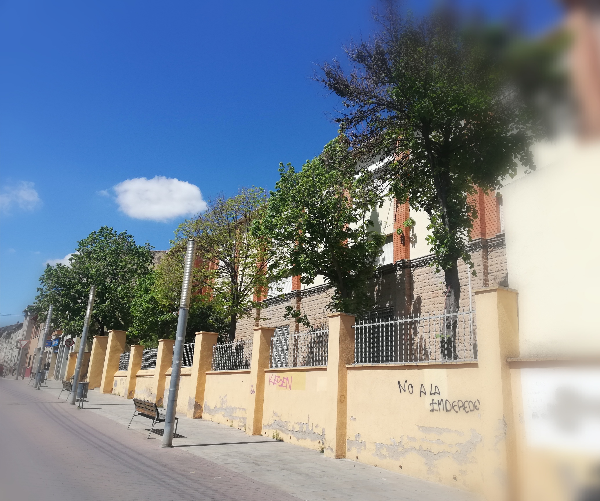 Façana lateral escola Anselm Clavé per la seva entrada del carrer del Sol